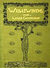 Williswinde